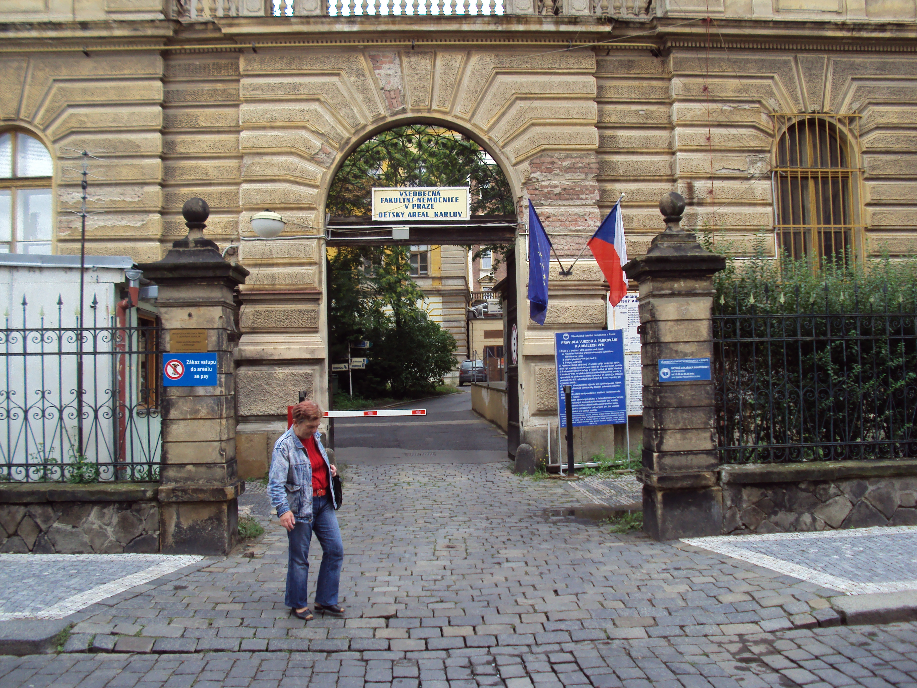 Všeobecná fakultní nemocnice, Praha, Karlov